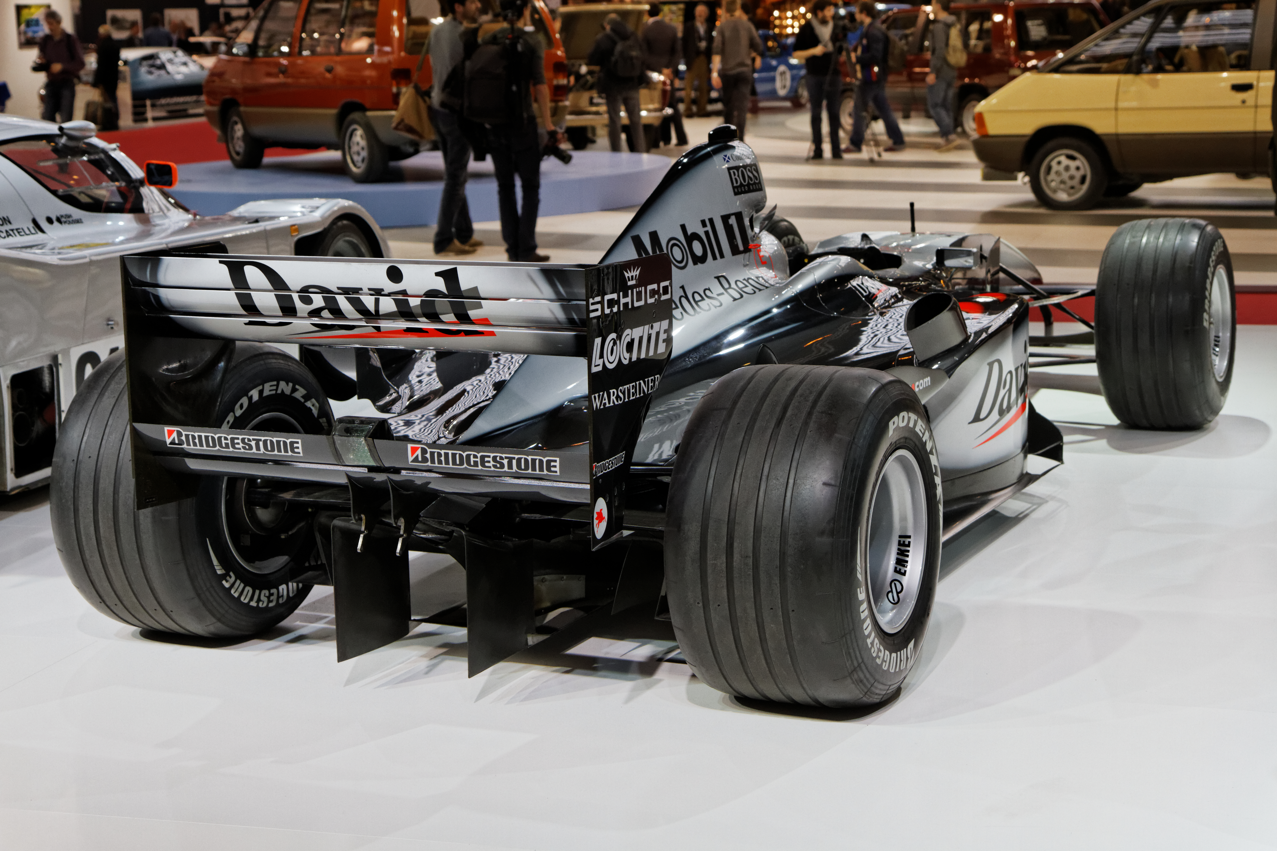 Une McLaren-Mercedes MP4-15 exposée lors du salon Retromobile 2014.